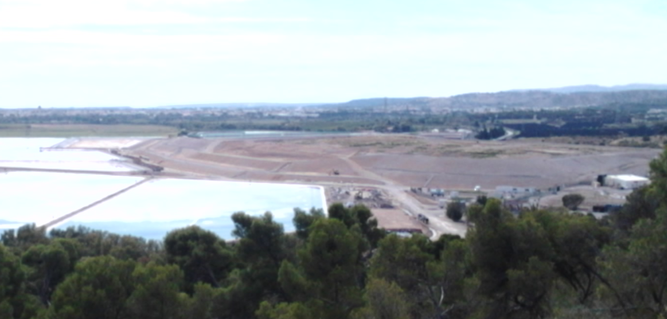 Monticule de déchets des anciens bassins B1 et B2 constituant l'installation nucléaire de base (INB) ECRIN (Entreposage des Résidus Issus de la coNversion). Photo prise depuis l'Oppidum de Montlaurès.